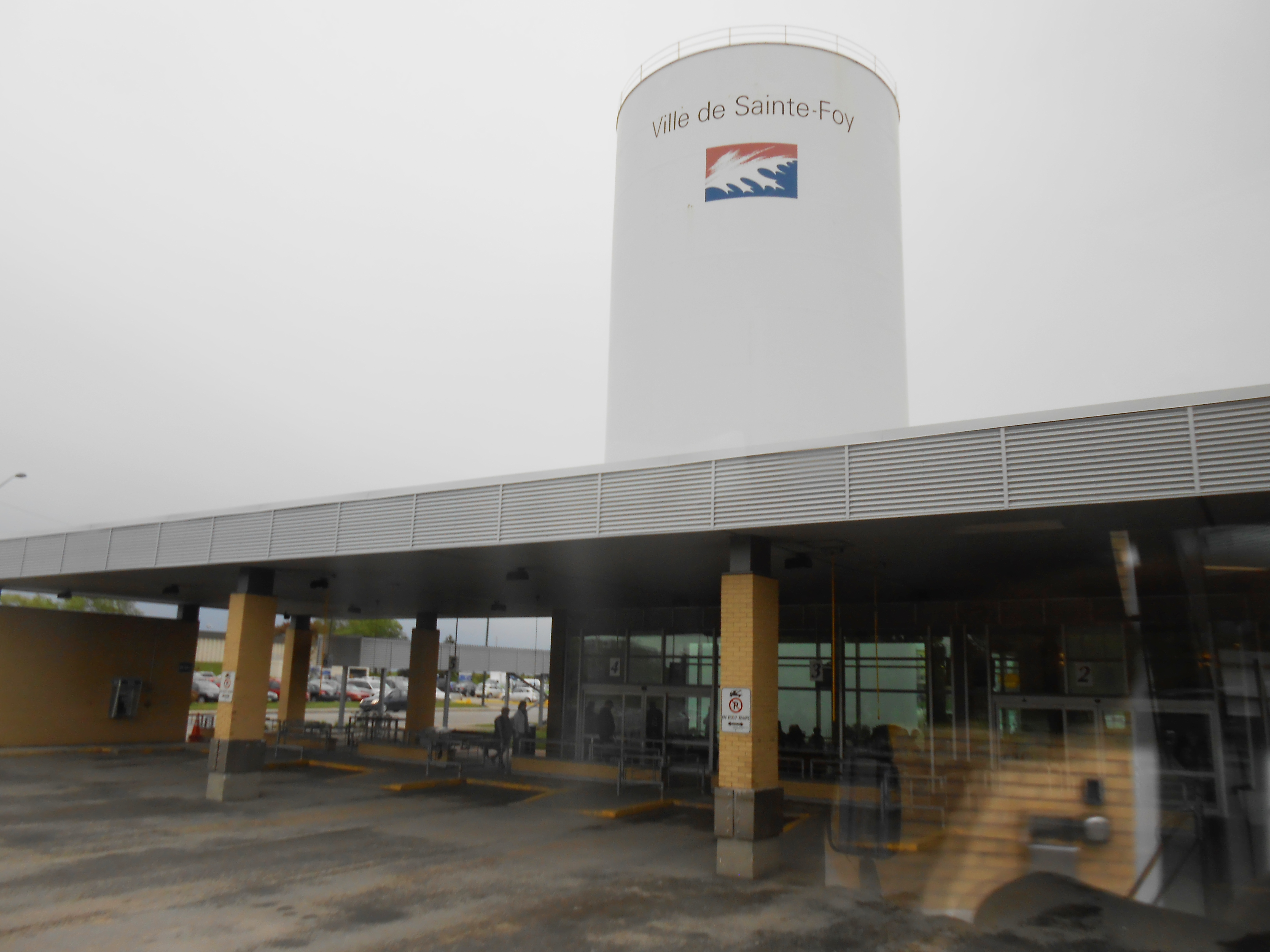 Gare d'autocars de Sainte-Foy, 3001, chemin des Quatre-Bourgeois, Québec (ville de), Qc, Canada